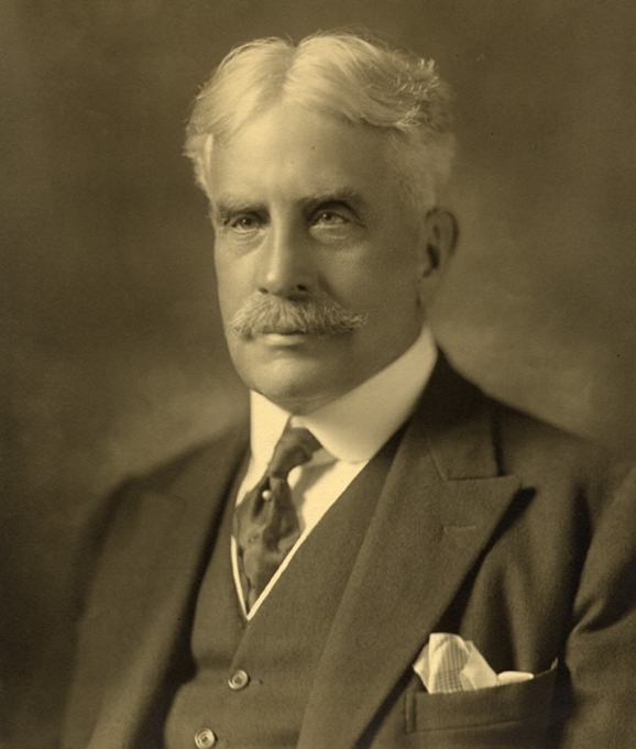 Sir Robert Laird Borden